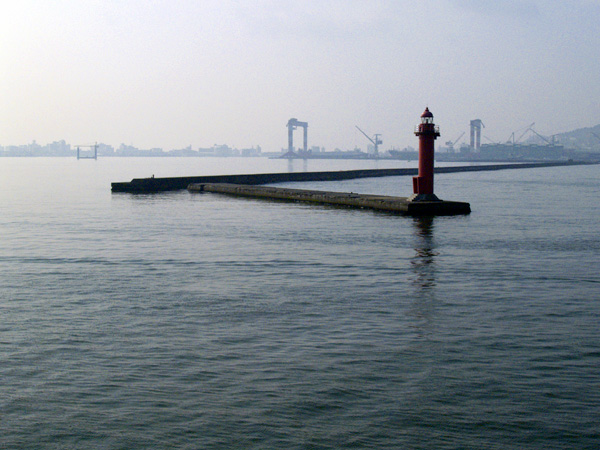 breakwater